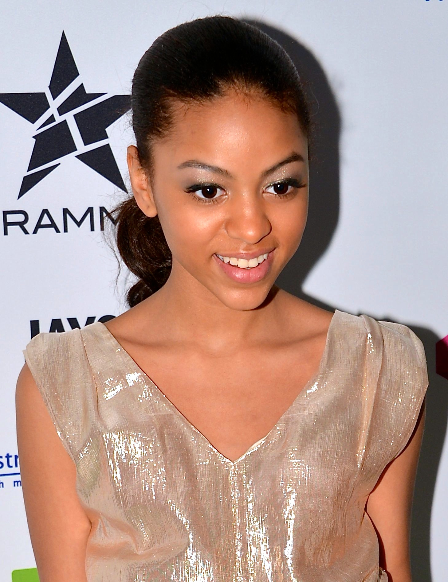 Awa Santesson-Sey på Grammisgalan på Cirkus, Stockholm den 20 februari 2013.